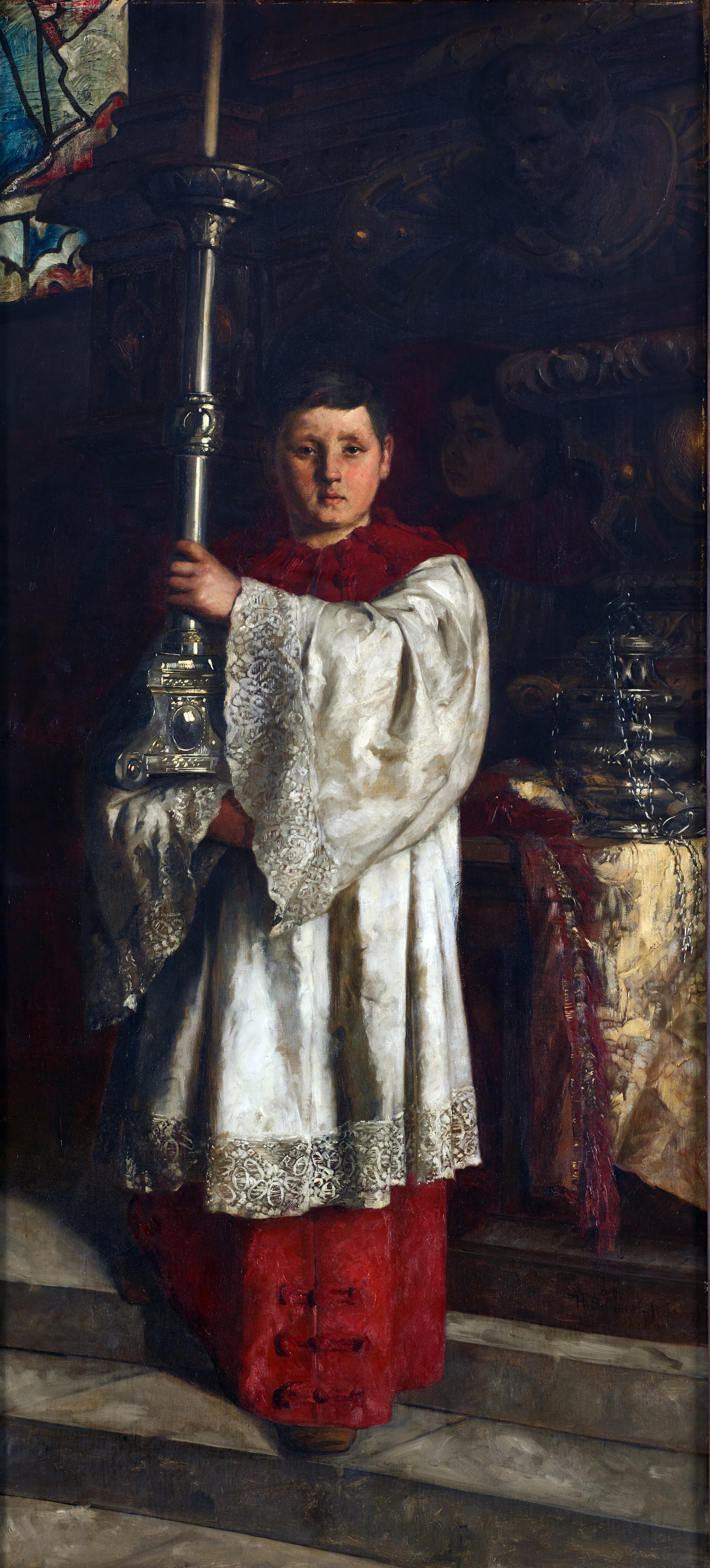 Heinrich Schmidt-Pecht: Chorknabe im Überlinger Münster; Öl auf Leinwand; 144 x 66,5 cm; Städtische Wessenberg-Galerie Konstanz, Nachlass Heinrich Schmidt-Pecht